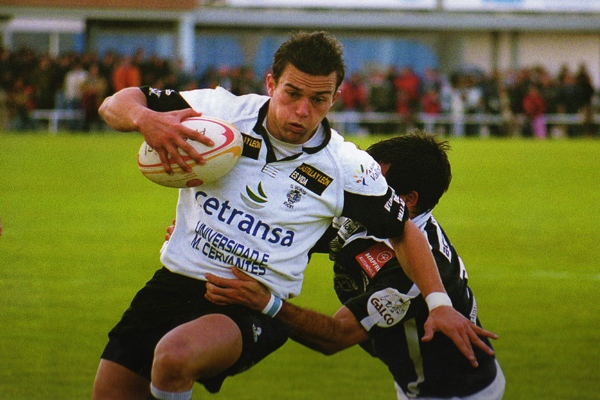 Cesar Sempere cuando jugaba en El Salvador rugby placado por un rival